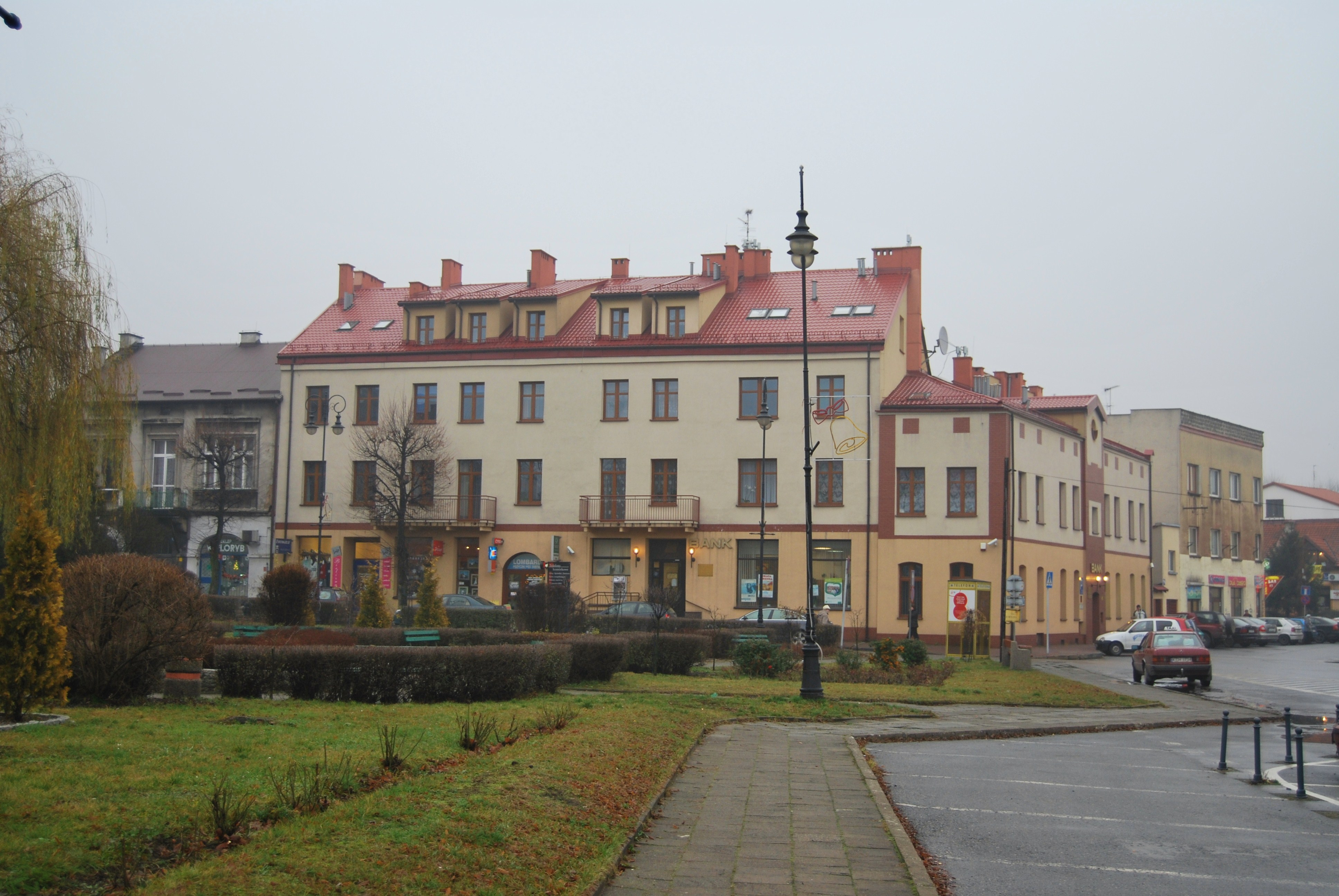 Trzebinia; rynek (2009).